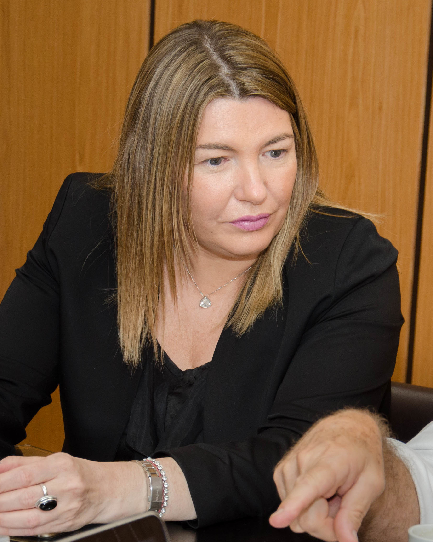 El ministro de Comunicaciones, Oscar Aguad, se reunió hoy con la gobernadora de Tierra del Fuego, Rosana Bertone, para avanzar en un plan que le permita a la provincia lograr mayor conectividad, a través de la ampliación del tendido de fibra óptica.